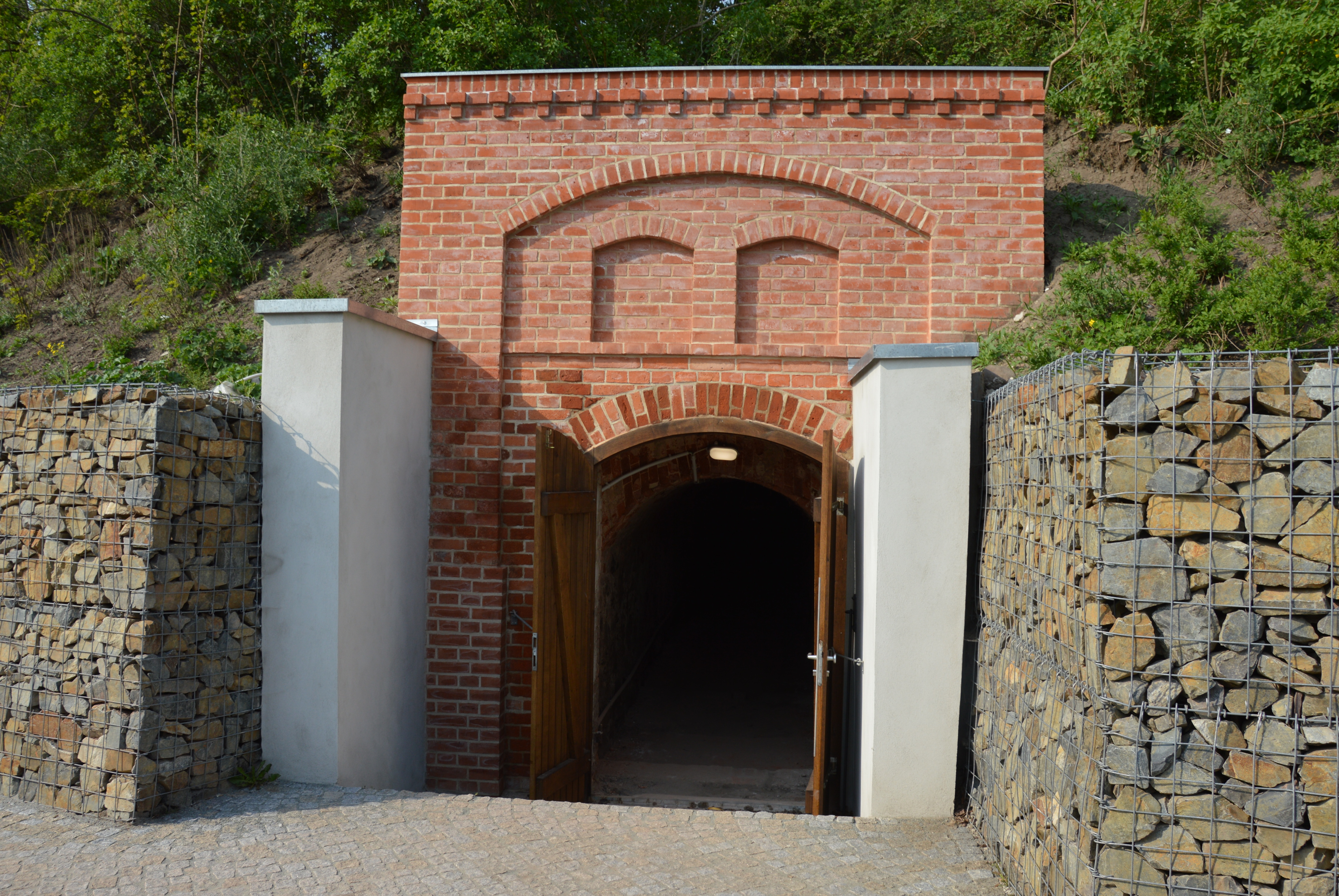 Eiskeller Weinberg Burg